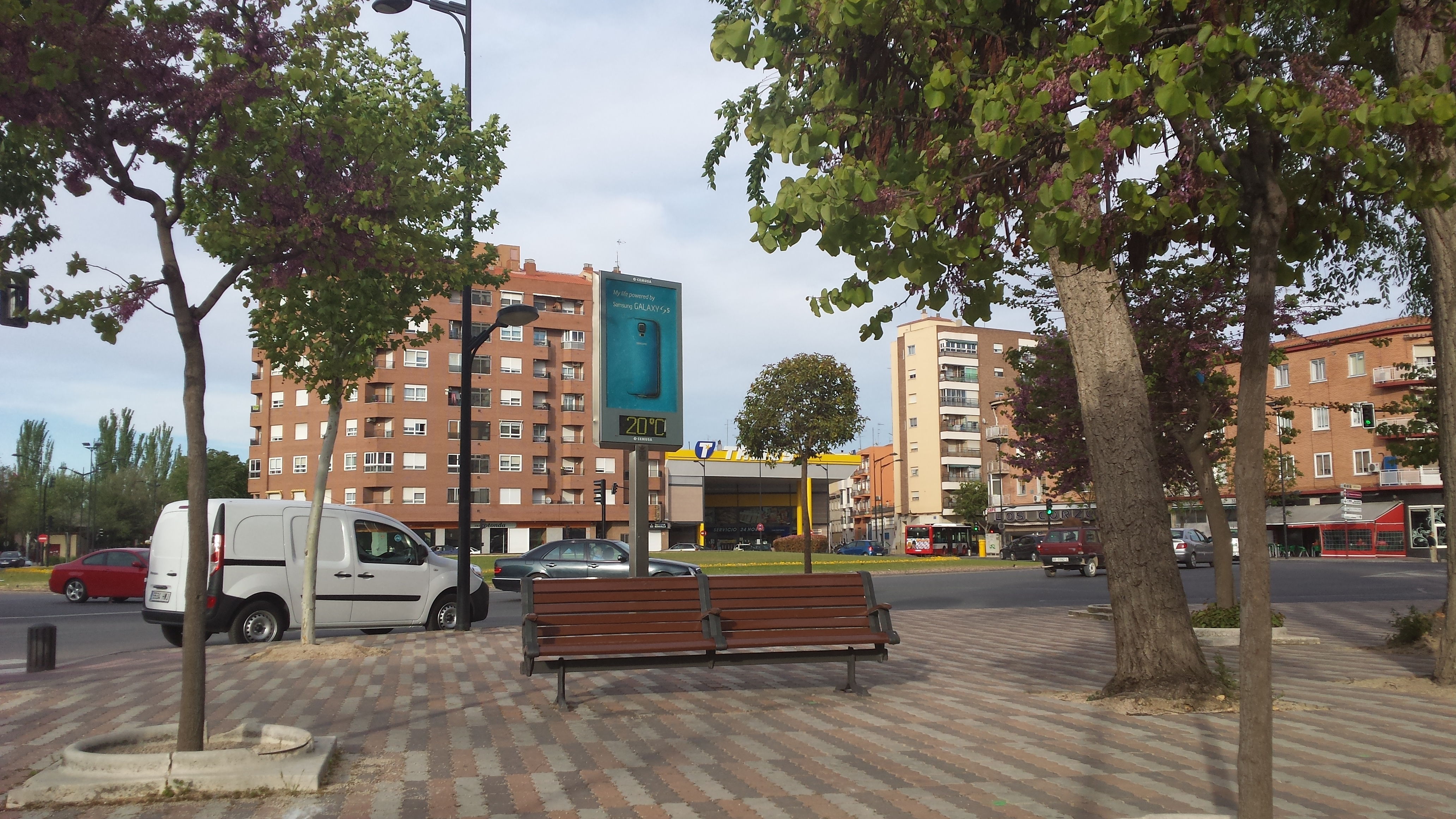 Fuente de la Tamos Albacete